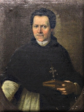 Isidor Teutschmann (1736 - 1827), Opat cisterciáckého kláštera ve Vyšším Brodě .